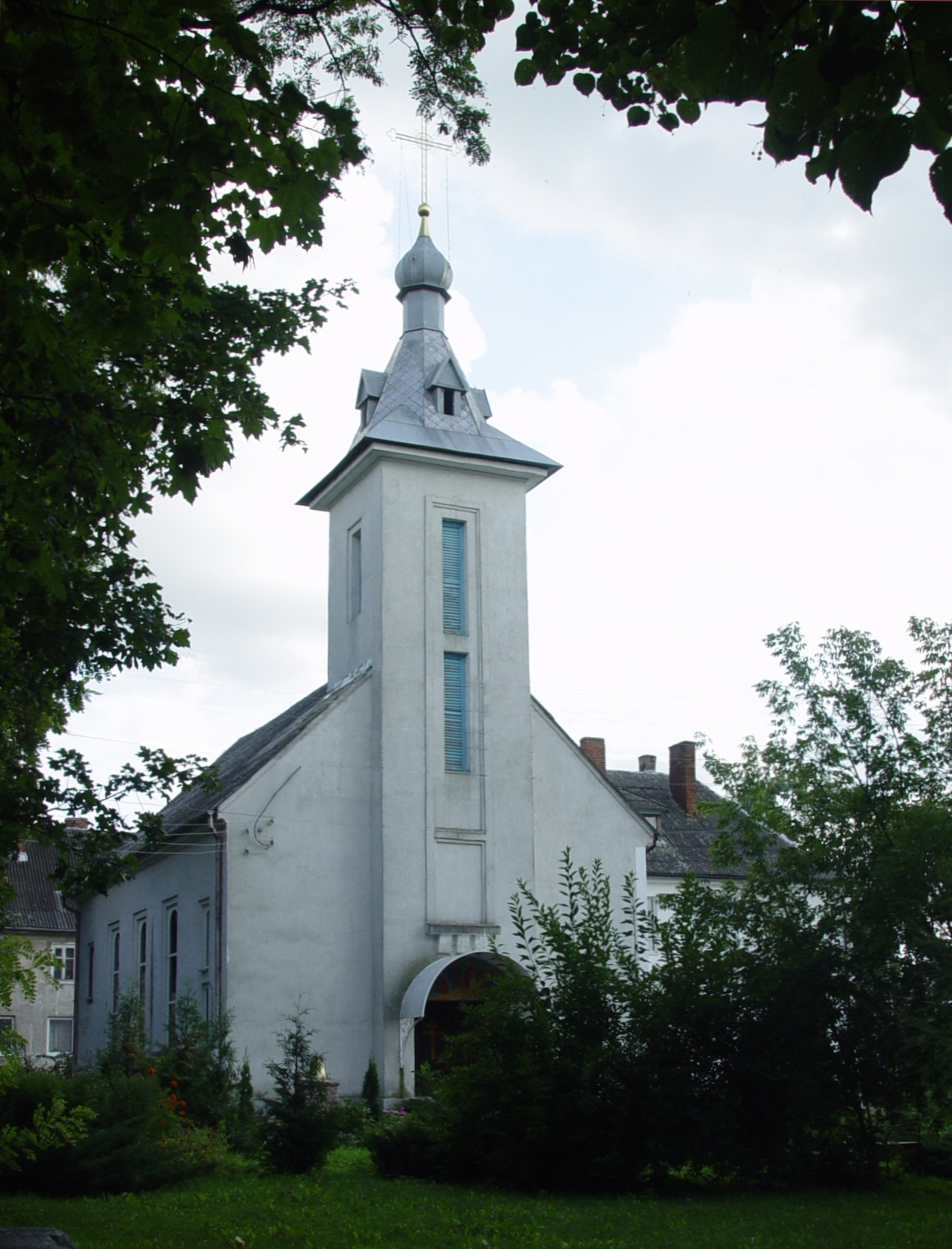 Костел (кат.) (Калиниградская область, Нестеров, город нестеров, черняховского улица, 56)